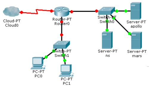 Opstelling van een netwerk met DMZ en intern netwerk